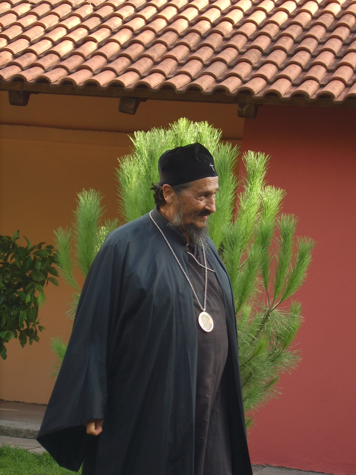 Српски (ћирилица): Владика Атанасије (Јевтић), у Требињу, 2011. године.